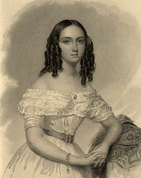 Софья Александровна Бенкендорф (1825-1875), дочь А. Х. Бенкендорфа. В первом браке за П. Г. Демидовым (1809-1858), во втором - за князем С. В. Кочубеем (1820-1880).